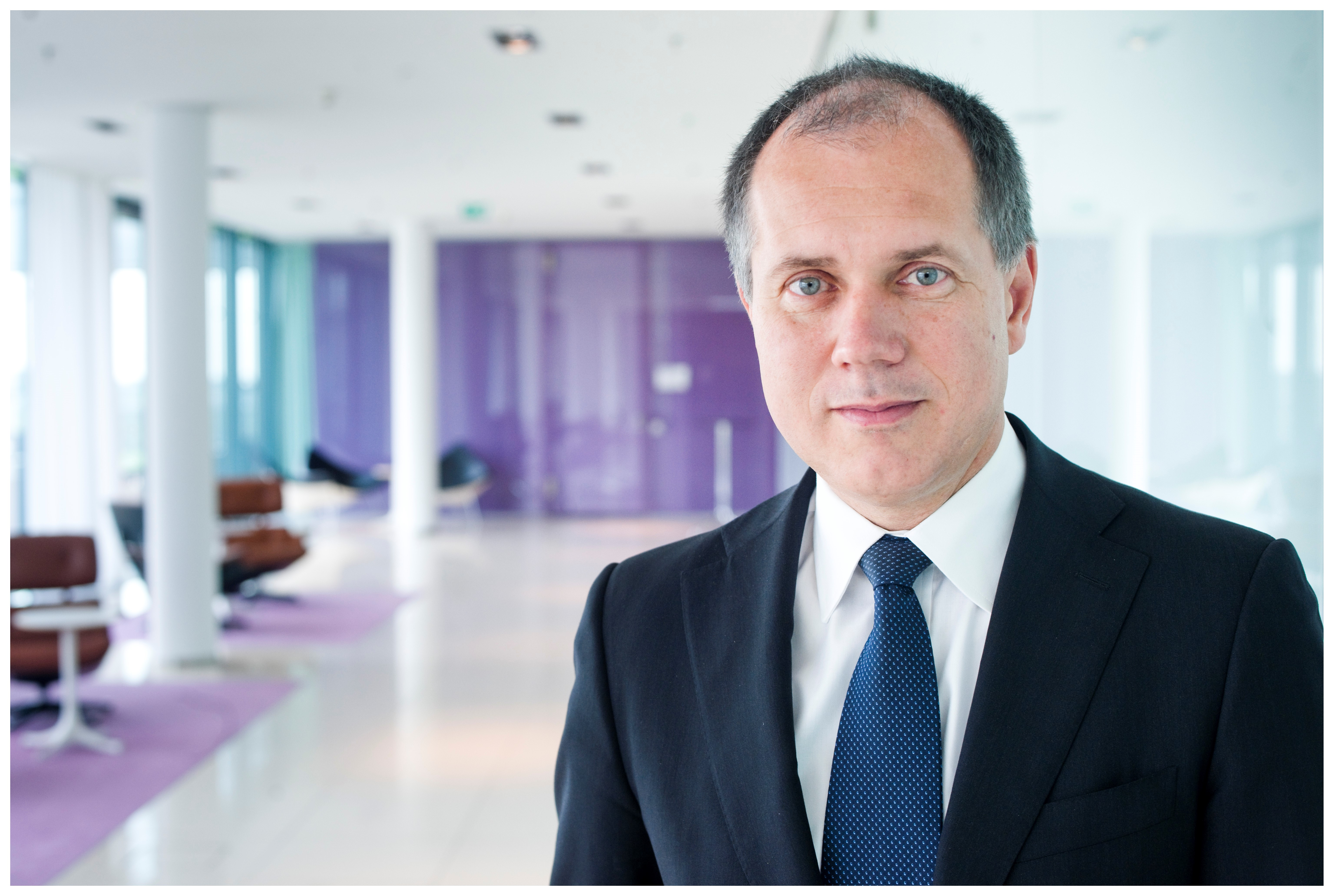 Frank Riemensperger - Manager und Geschäftsführer Accenture DACH